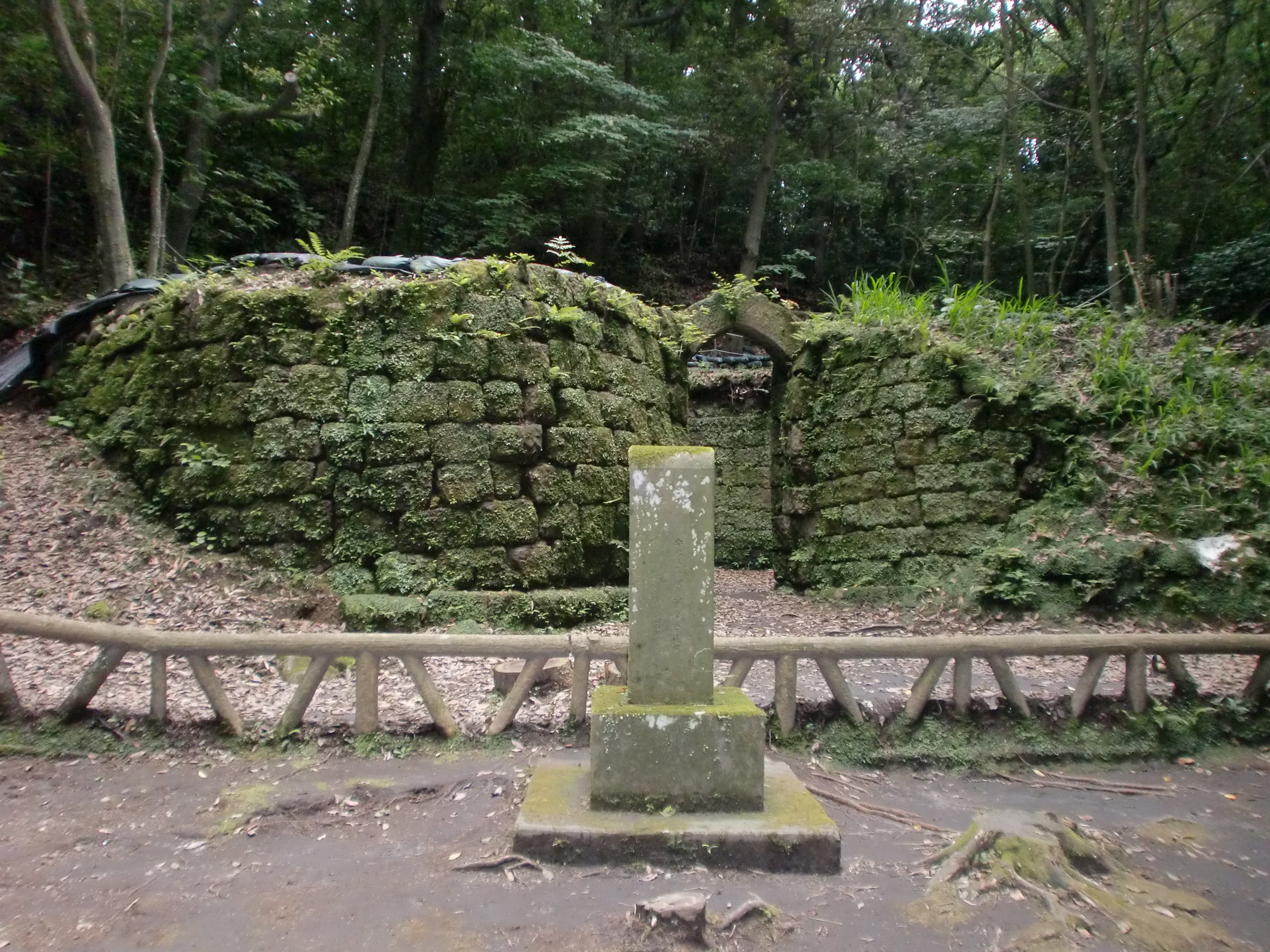 寺山炭窯跡（世界文化遺産）の俯瞰。